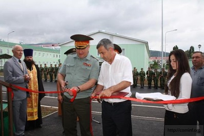 Командующий 58 армией генерал-майор Гурулёв А.В. открывает новый военный городок, Цхинвал, 2014 год.